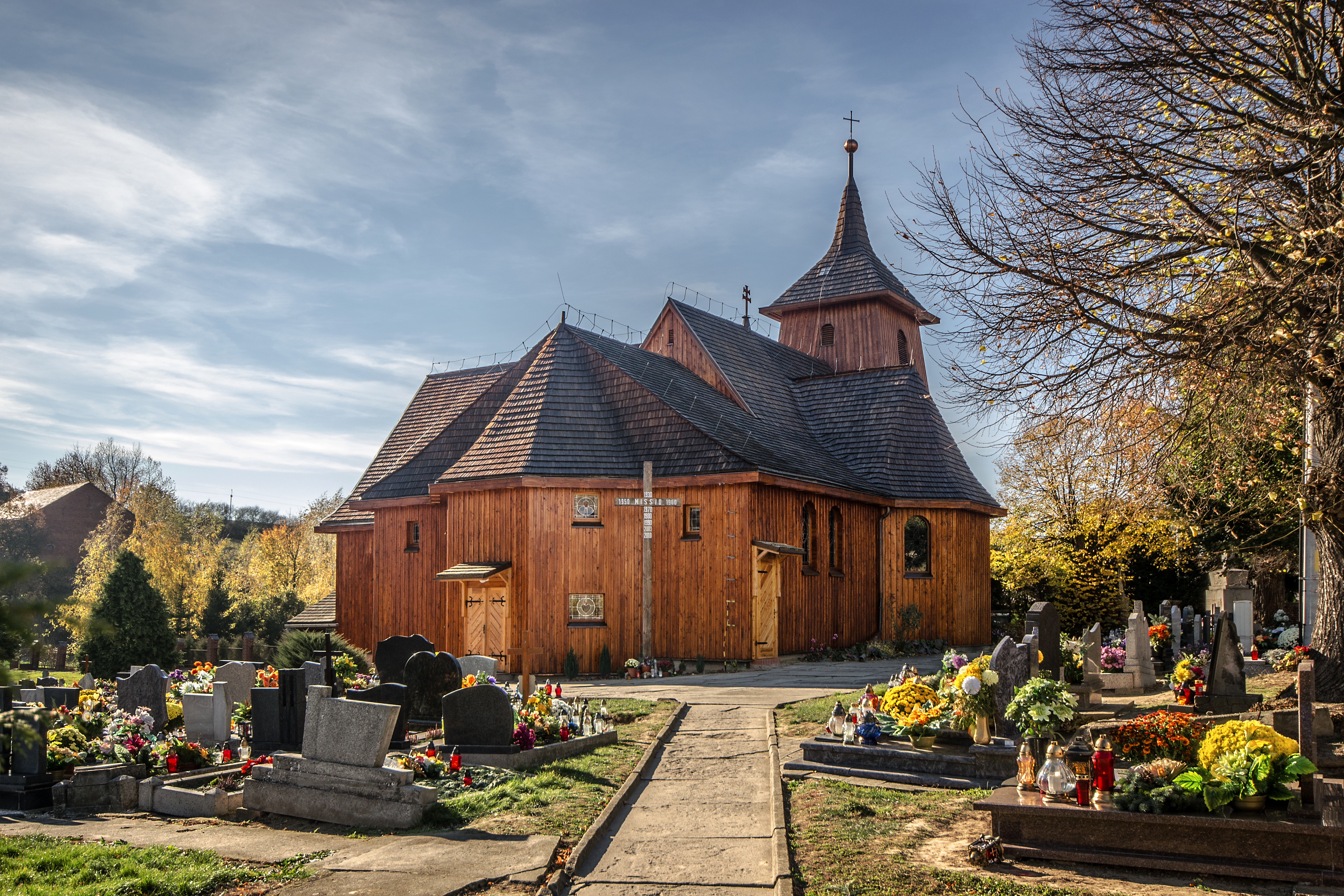 Radoszowy, ul. Główna 46 - rzymskokatolicki kościół parafialny pw. św. Jadwigi Śląskiej, 1929